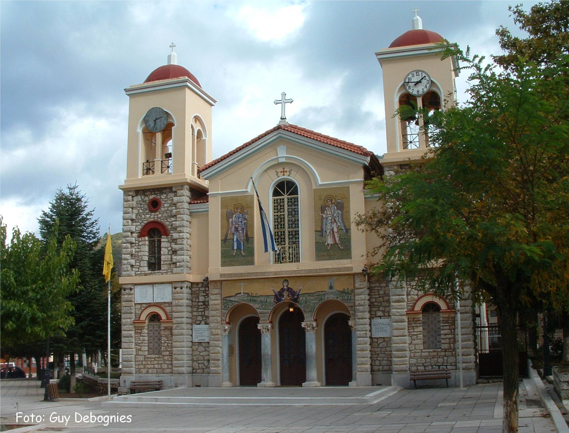 november 2005